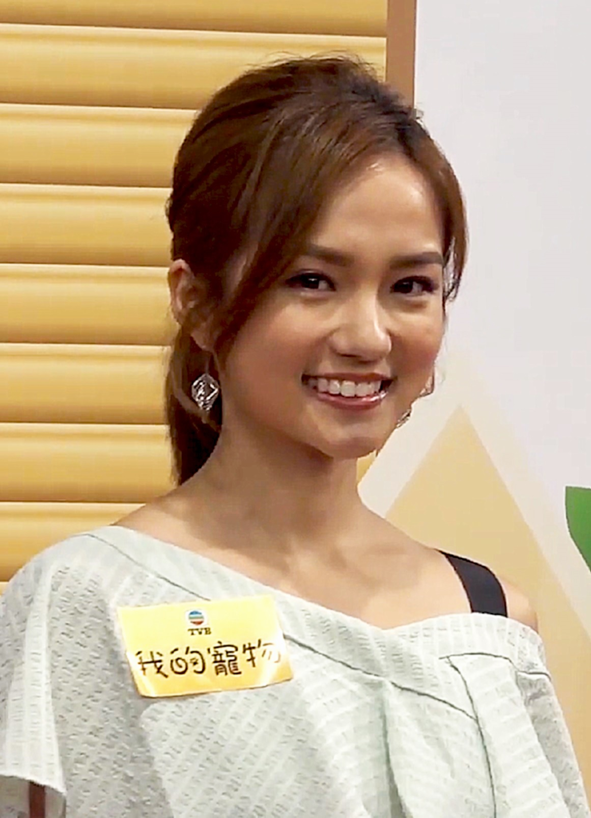 中文（香港）: 《我的寵物》宣傳活動